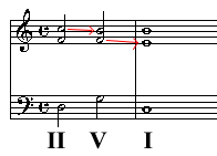 zelfgemaakte media